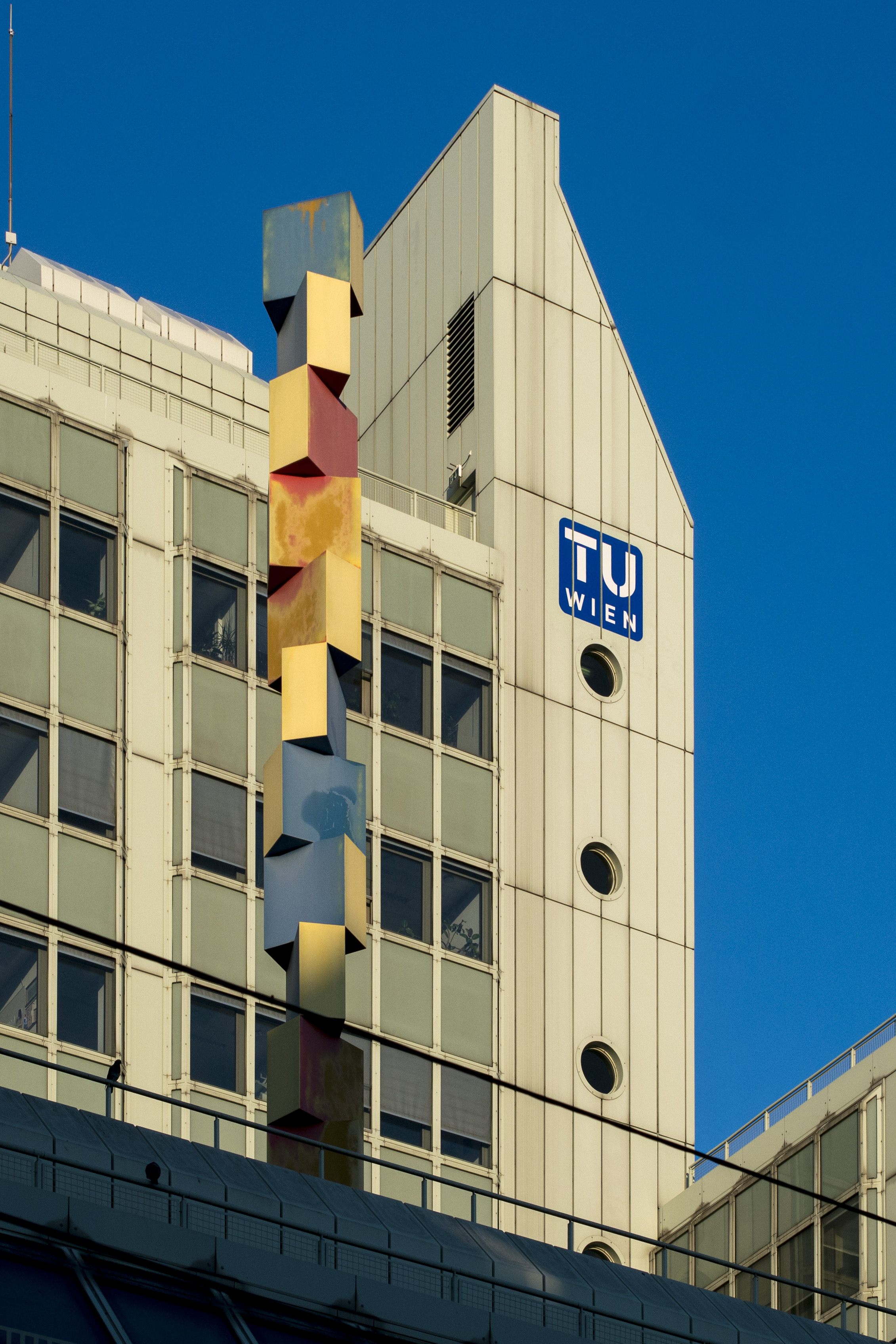 Kunstwerk von Roland Goeschl, TU Wien